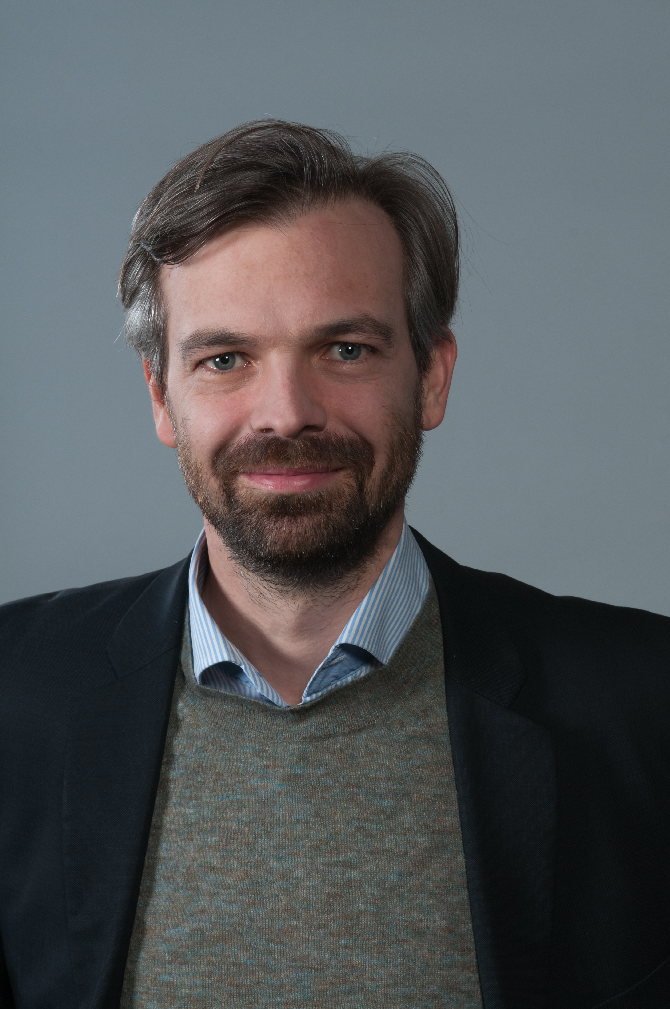 Martin Ehrenhauser, Österreich, 2014 Mitglied des Europäischen Parlaments (MEP)